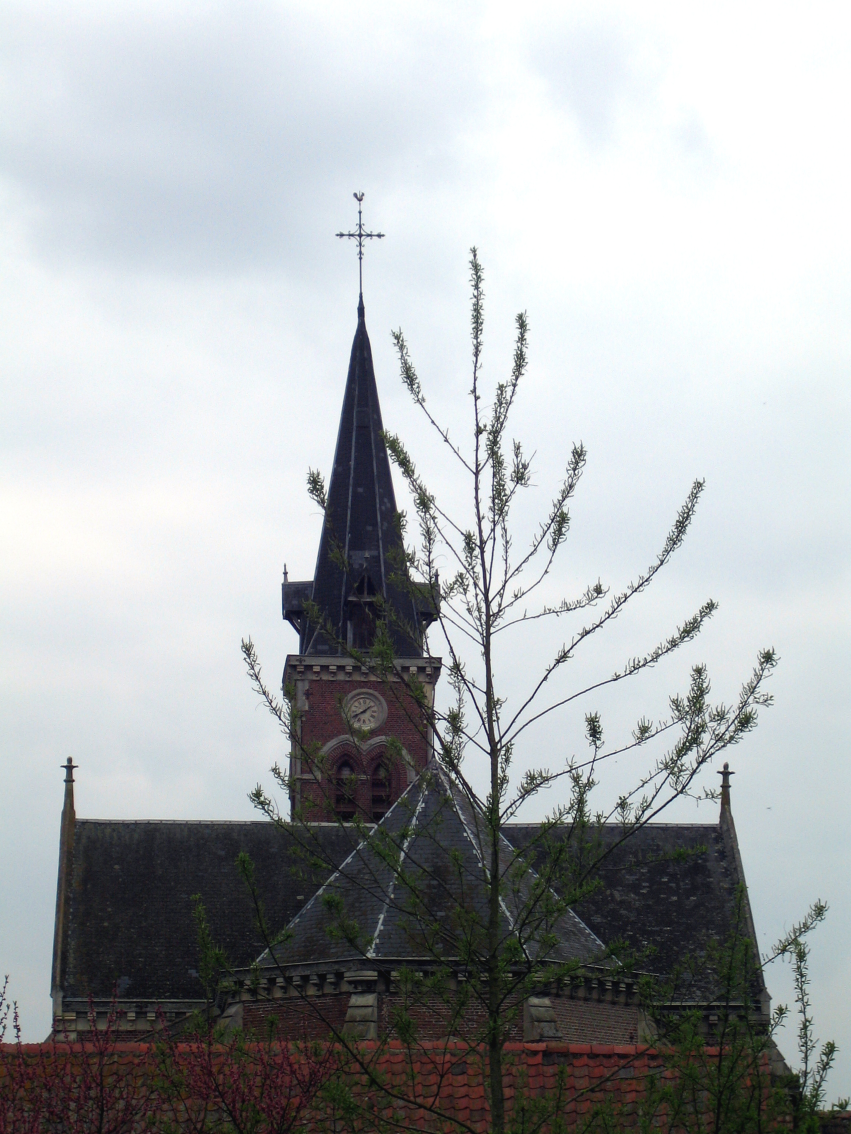 Bovelles (Somme, France) - Silhouette (vue depuis un jardin privé) de l'église (côté Est). La flèche du clocher est surmontée d'une girouette de remplacement. En effet, le coq original fut malmené par une tempête quelques mois avant, et dut être descendu. Le coq de cette photo est nettement plus petit que l'original et a suscité quelques critiques des villageois à cause de sa taille "ridicule".